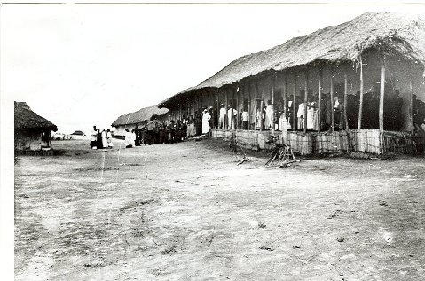 Residence de Ngongo Leteta à Ngungu.